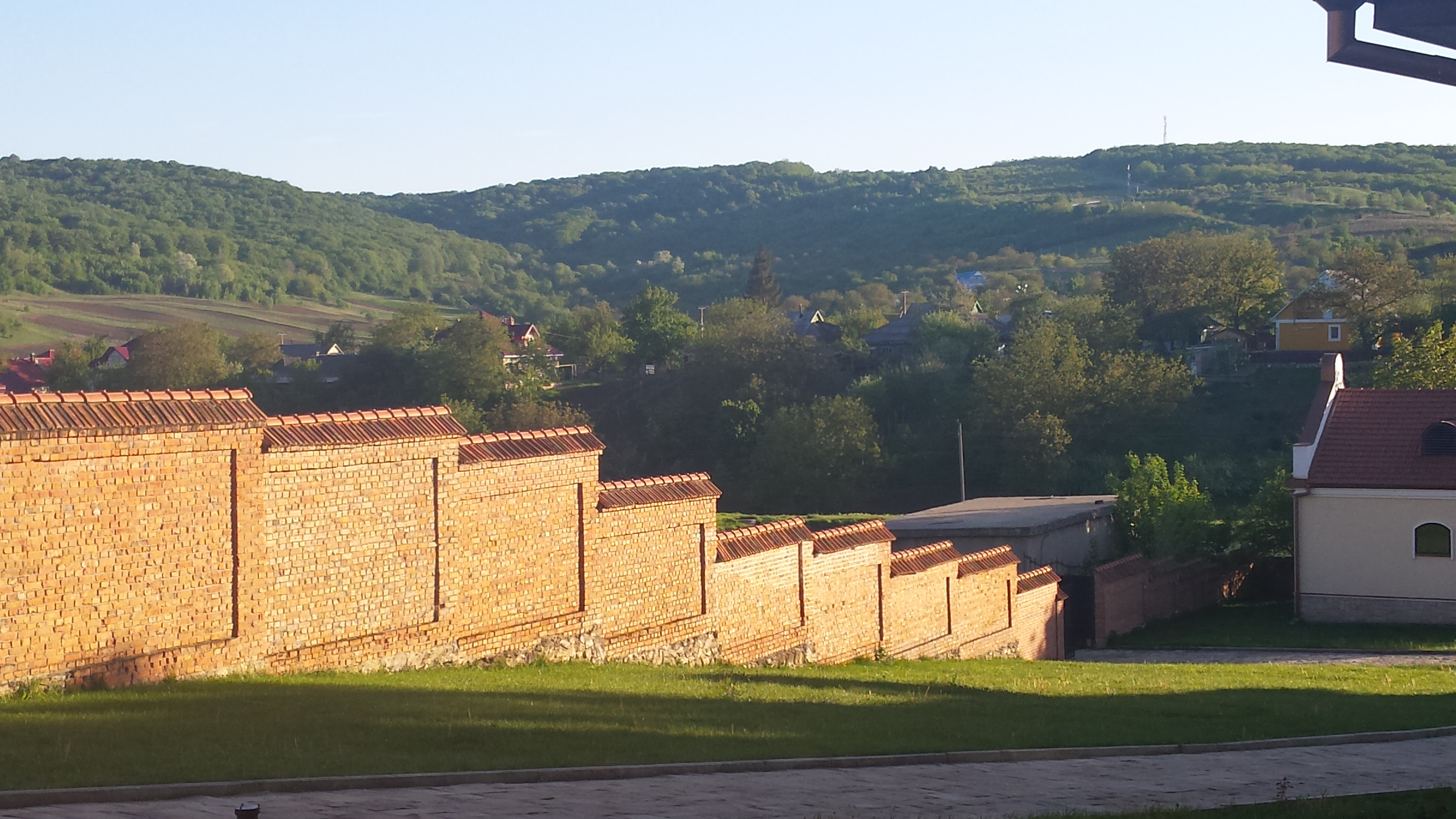 Codrii dinspre Mănăstirea Căpriana, R. Moldova